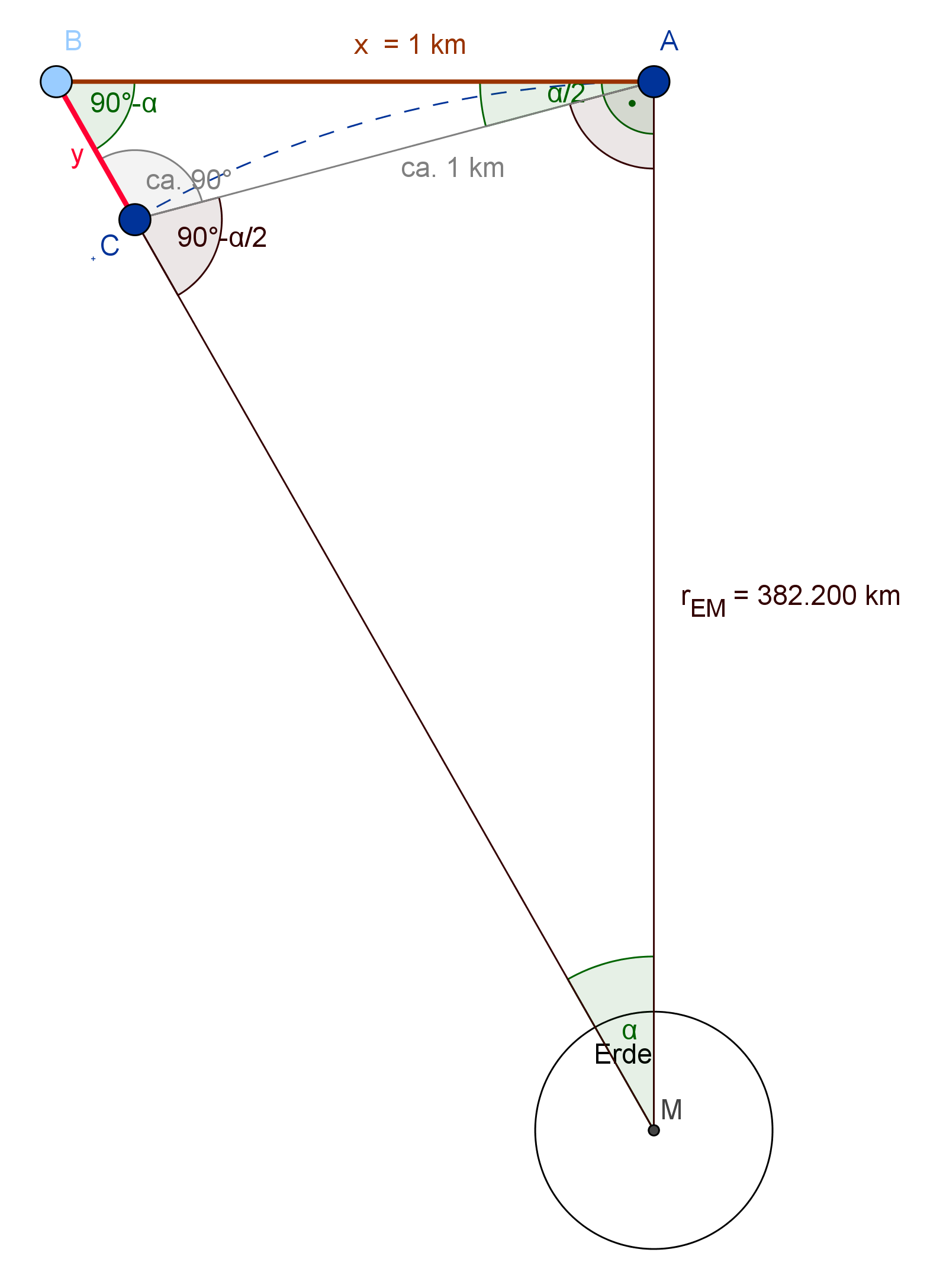 GeoGebra-Skizze zur Berechnung des "Falltiefe" des Mondes.